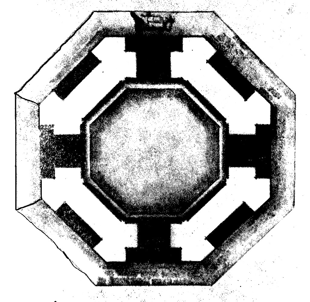 Dər türbəsinin planı